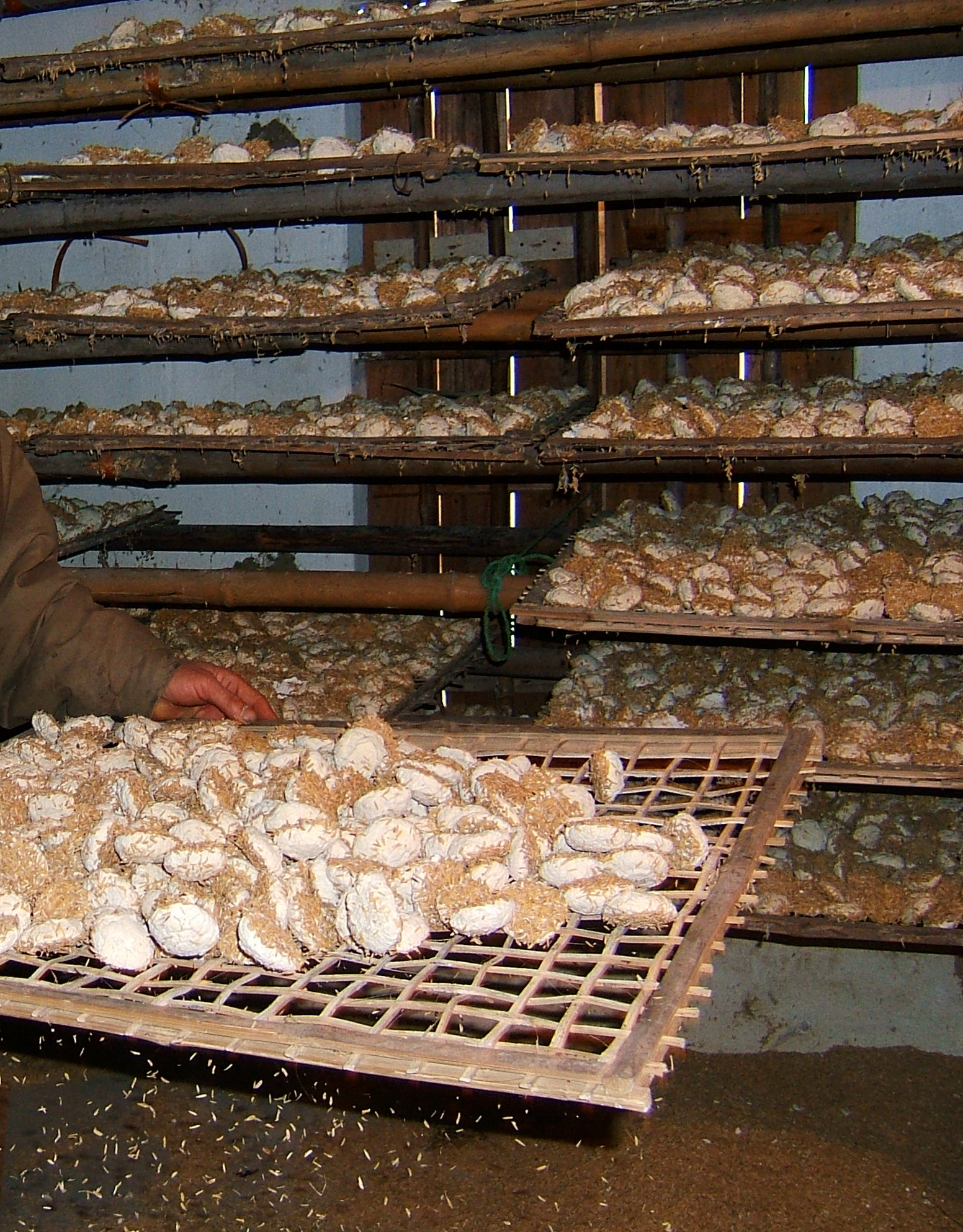 Ảnh được chụp tại một nhà nghệ nhân làm men rượu ở Làng Vân.